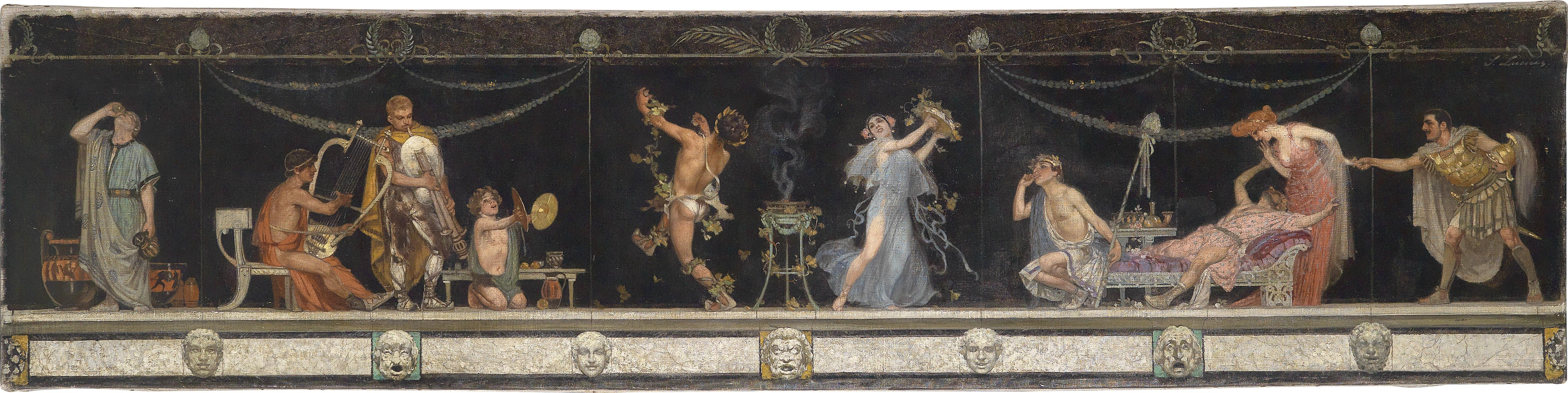 Supraporte - Römisches Fries, Öl auf Leinwand, 46 x 190 cm, ausgestellt bei der Großen Berliner Kunstausstellung 1898, Nr. 645.